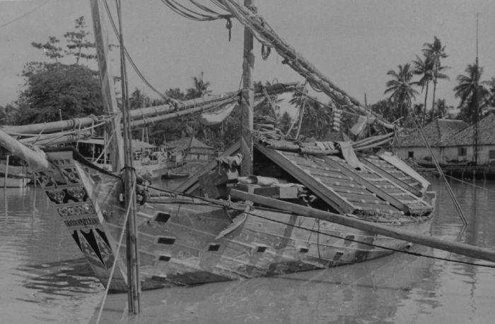 foto. Madurese prauw in Pasar Ikan, Batavia